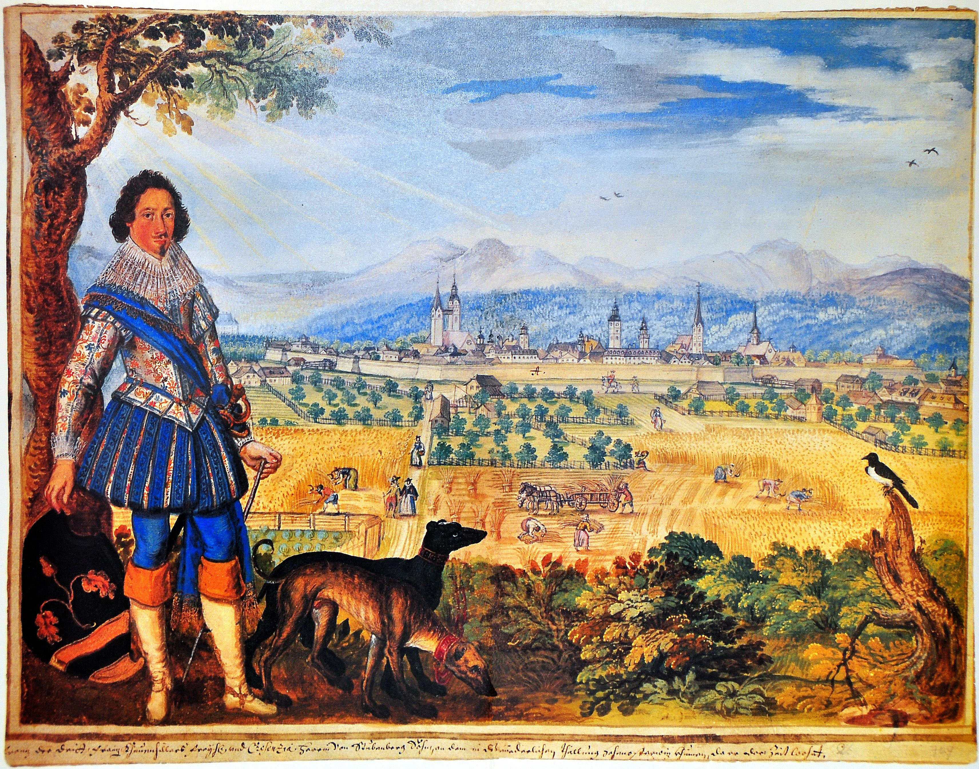 Baron Franz III. Khevenhüller in front of Klagenfurt am Wörthersee, Carinthia, Austria